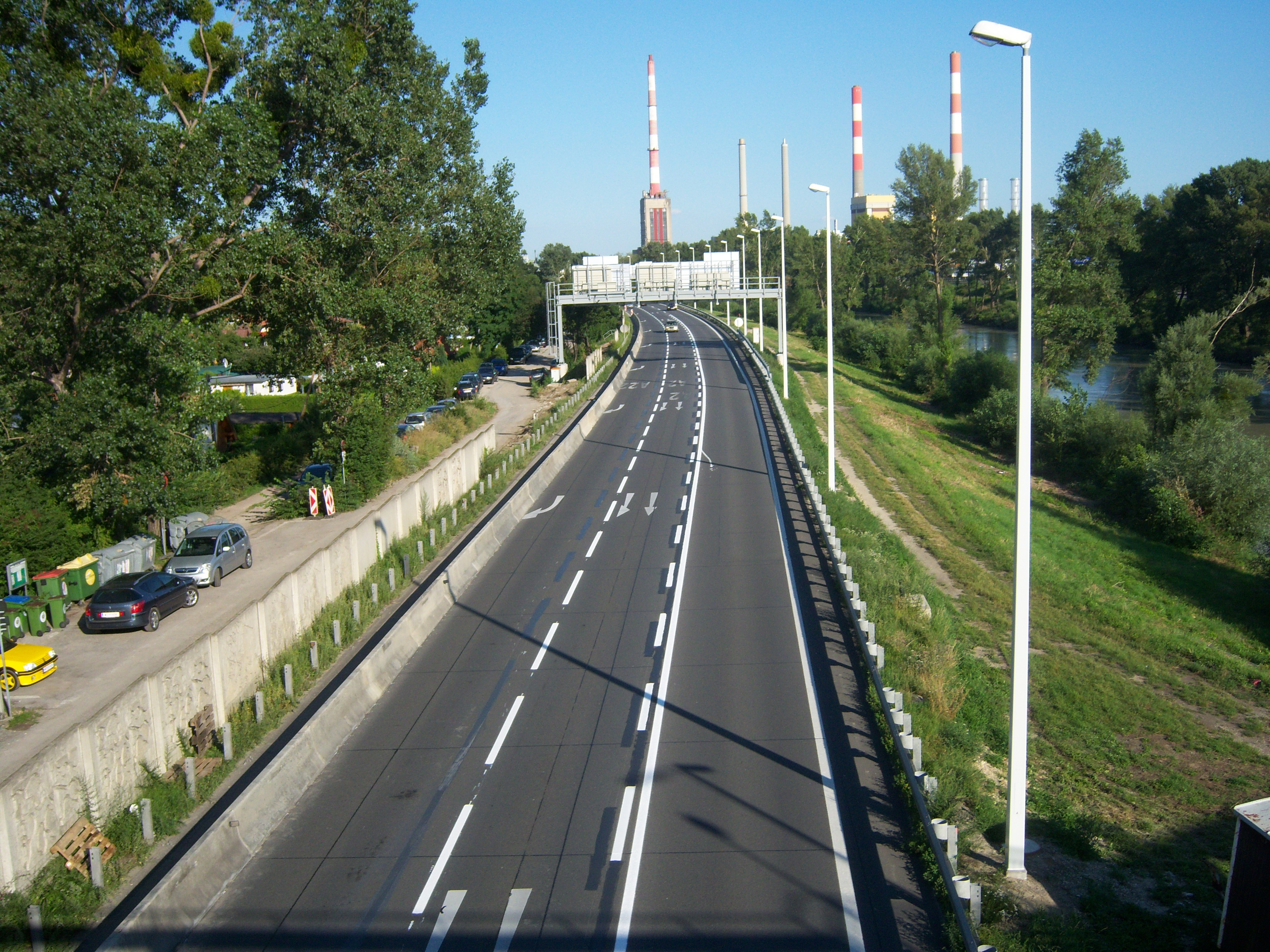 A4 Ost Autobahn kurz vorm Knoten Prater